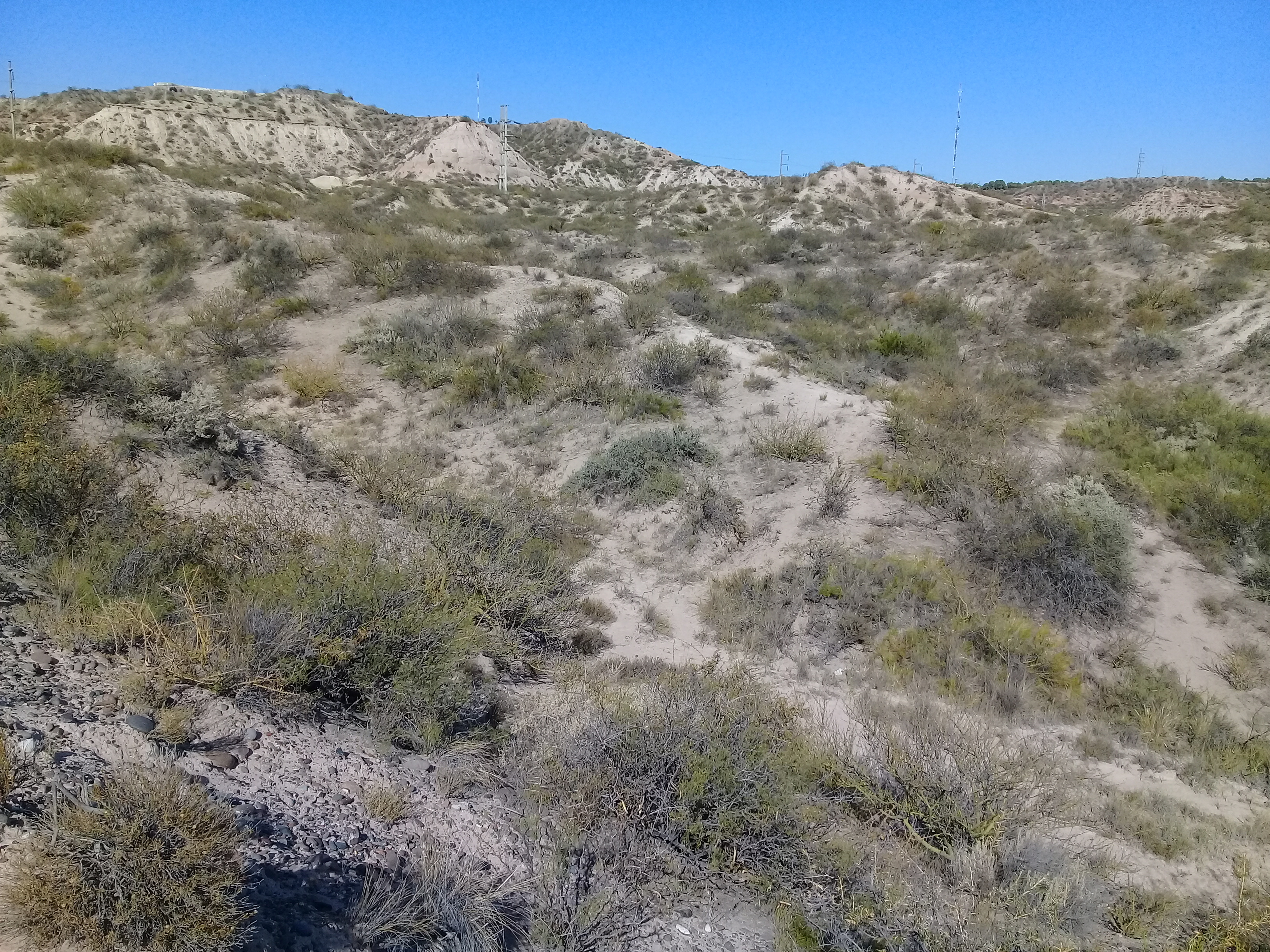 Paisaje en el Parque Universitario Provincia del Monte, ciudad de Neuquen.